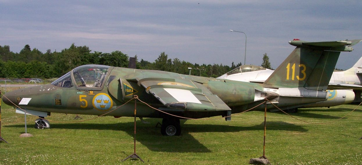 Flygplan 60113 var den sista Sk 60 som flögs med ursprungliga RM 9 motorer, de franska Turbomeca Aubisque. Flygplanet var placerat vid F 5 och FMV:ProvFC Malmslätt. Det tillfördes Flygvapenmuseum sommaren 2001 och placerades i utomhusutställningen. I samband med om- och tillbyggnaden av museet 2010 fick flygplanet sin nuvarande plats i Hall 3.